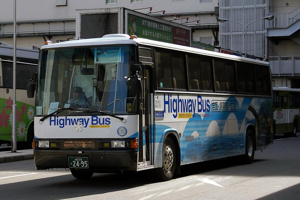 事業者: 岩国市交通局 陸運登録: 山口22う24-95 シャーシ: 日野自動車 P-RU638BB 車体: 日野車体工業 年式: 不明 撮影場所: 佐波川SA